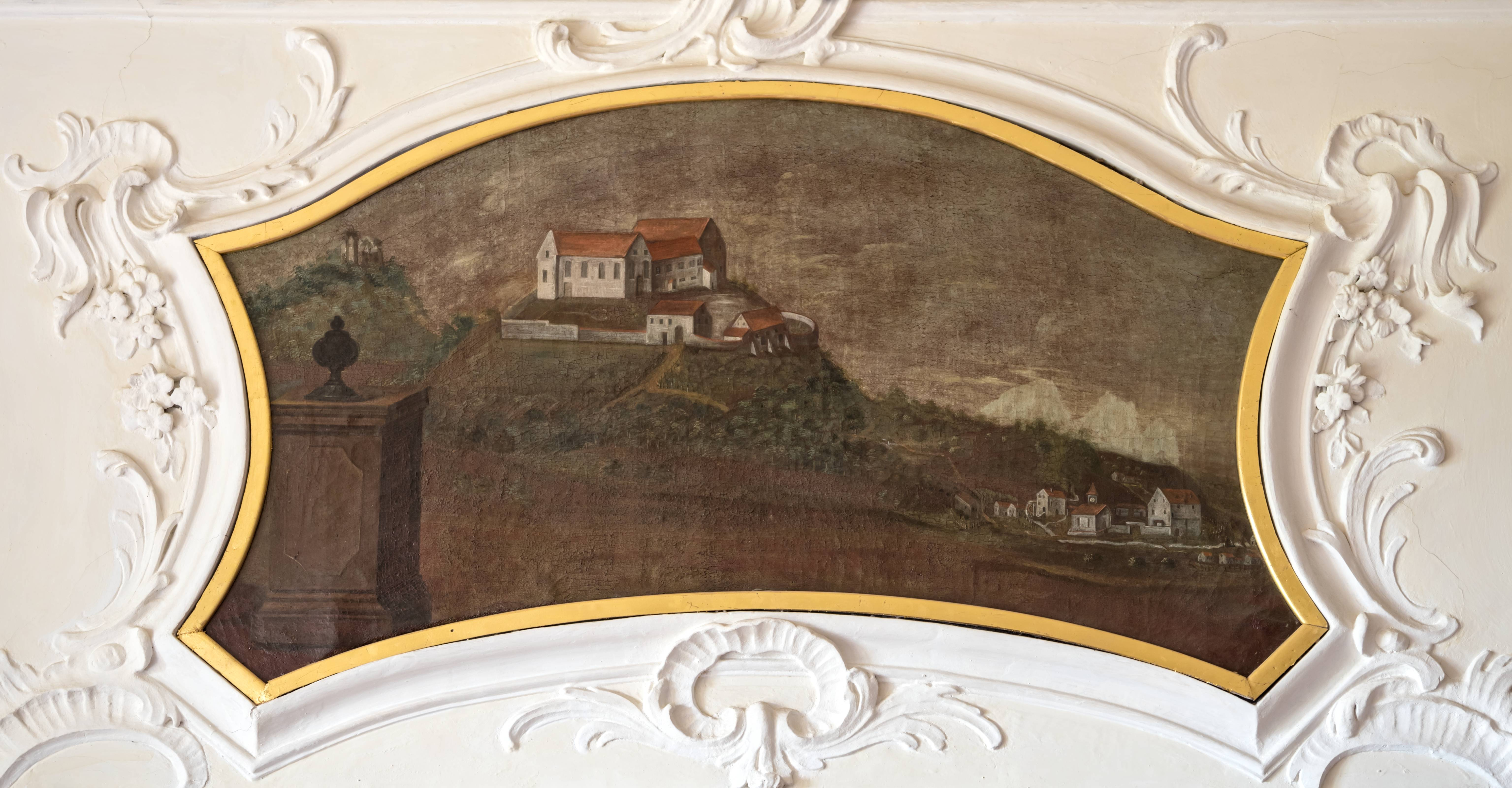 Bilder aus dem Schloß Bürgeln Hier Bilder von den Supraporten im ersten Stock des Schloßes. Es sind Bilder der Probsteien des Kloster St. Blasien und einige Füllbilder in einem später erstellten Flügel Schloß Bürgeln ursprüngliche Form